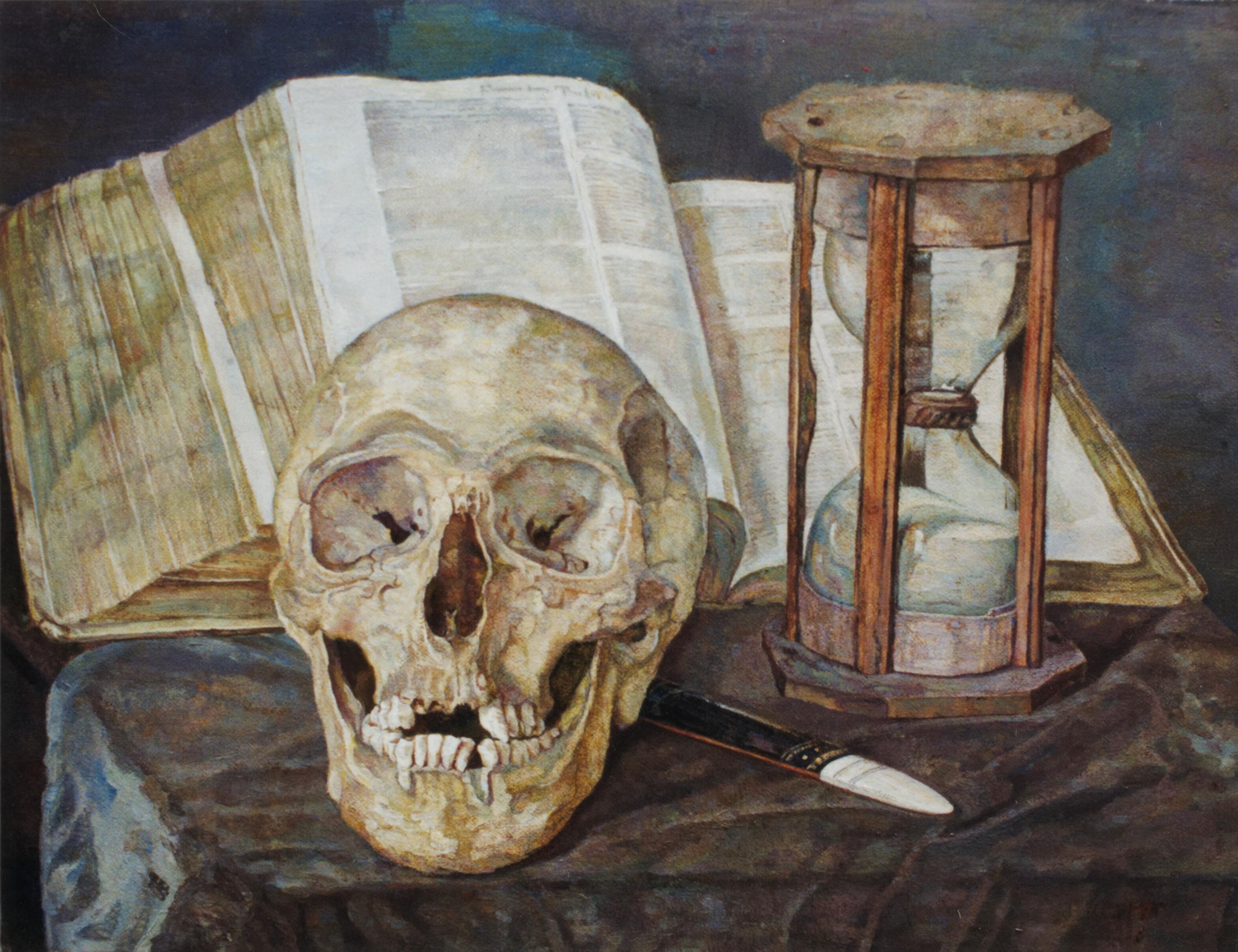 Vanitas stilleven met schedel, zandloper en boek van Corrie Pabst, linksonder gedateerd en gesigneerd.